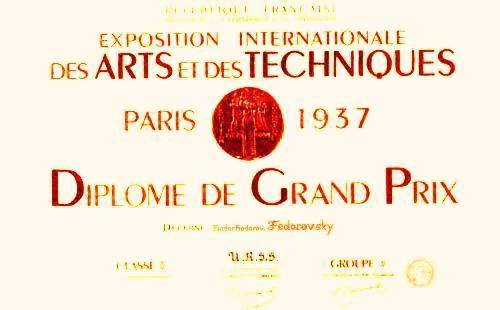 Диплом GRAND PRIX Всемирной Выставки в Париже 1937 года.